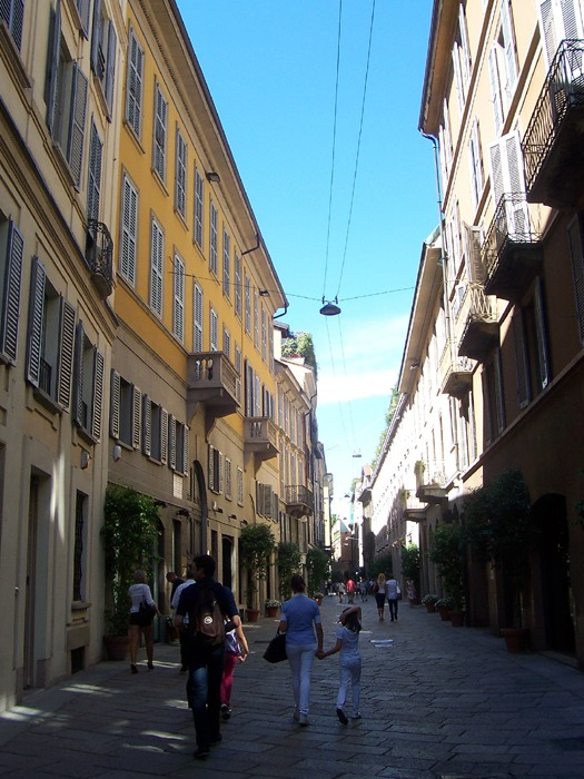 Milano - Via della Spiga